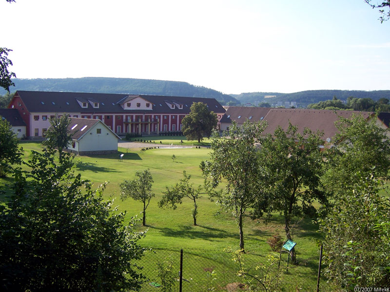 Praha-Lipence, golfové hřiště / Prague-Lipence, golf course